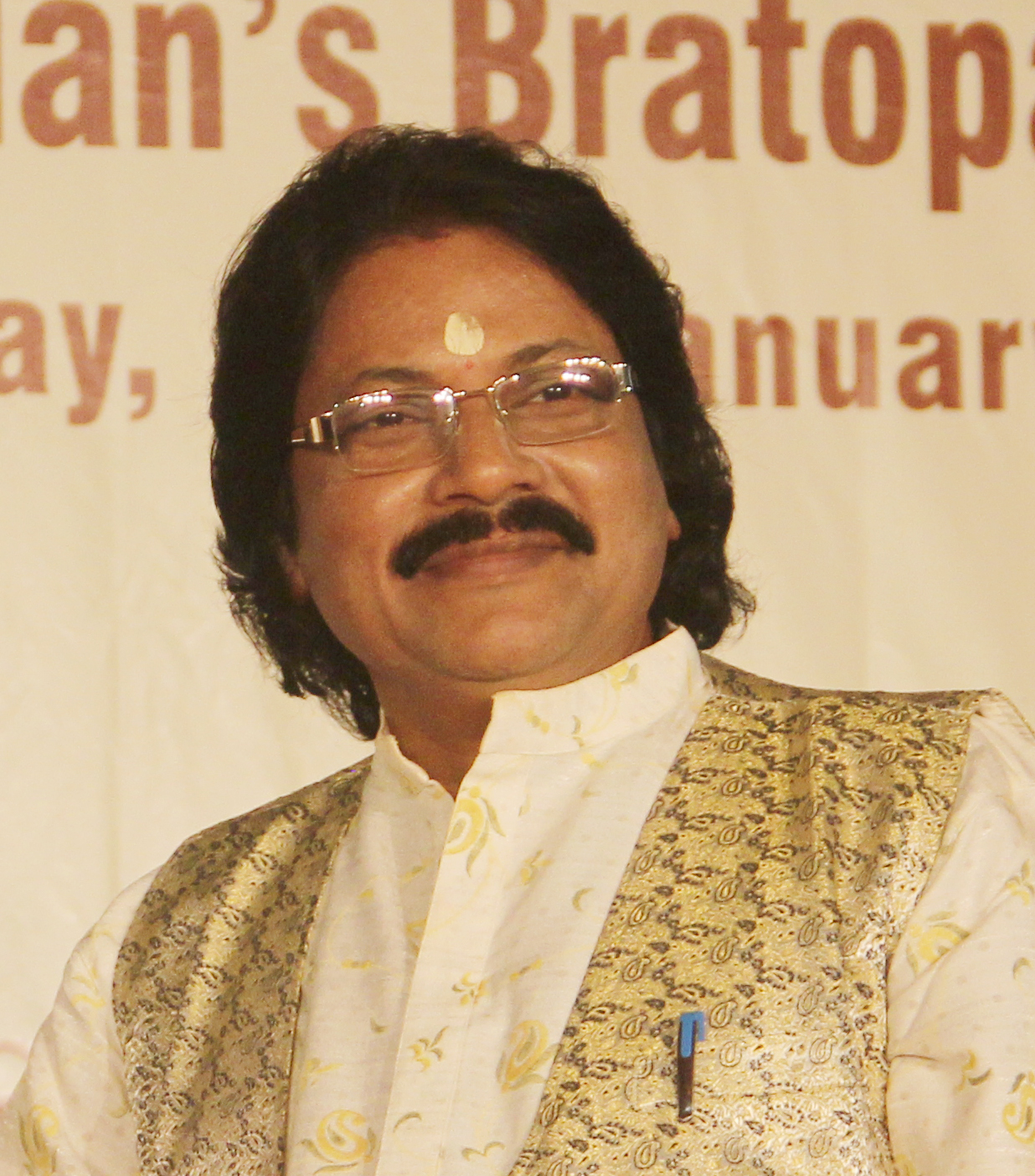 ଓଡ଼ିଆ: Arabinda Muduli (Odia Bhajan Maestro)